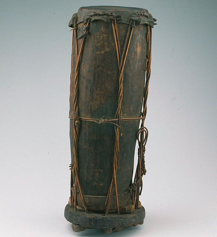 Slaginstrument. Enkelvellige tonvormige trom Unknown language: Tataganing